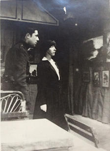 En 1916, exposition de la Section Artistique de l'Armée belge en campagne à La Panne en Belgique.